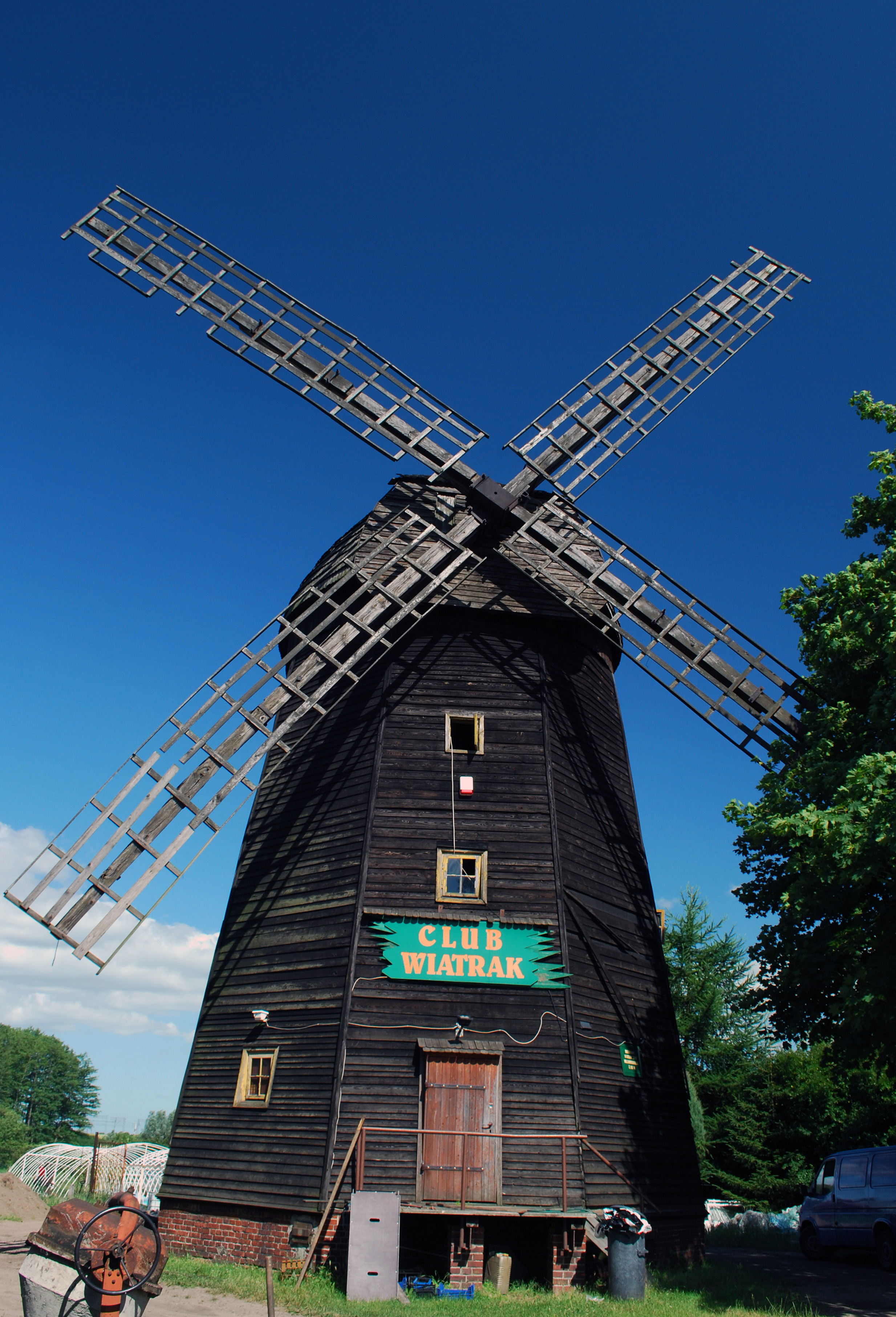 Wiatrak typu „holender” w Pszczółkach.